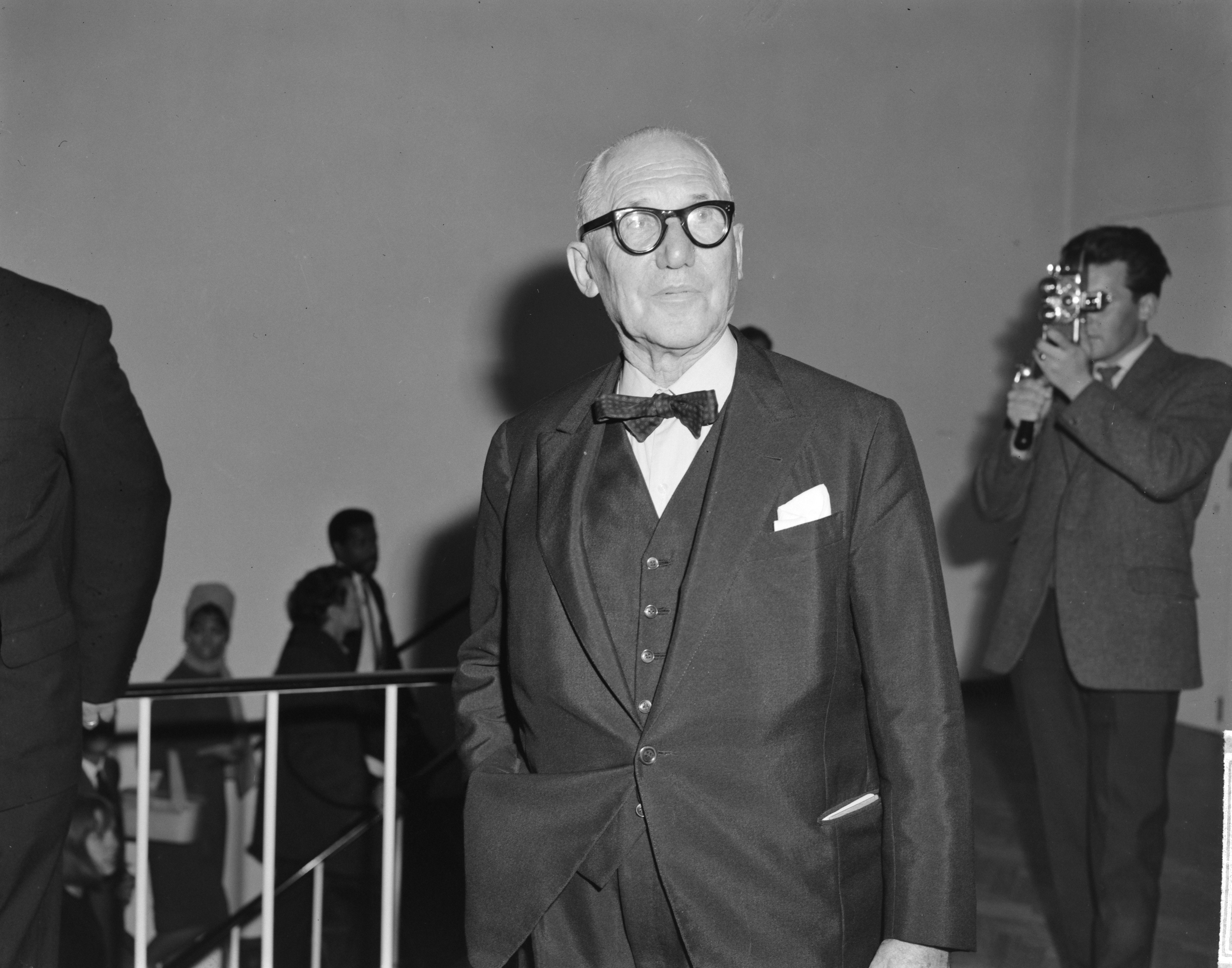 Collectie / Archief : Fotocollectie Anefo Reportage / Serie : [ onbekend ] Beschrijving : Le Corbusier. In Stedelijk Museum Sikkensprijzen uitgereikt, Livinus van de Bundt Datum : 26 september 1964 Trefwoorden : Musea, prijzen, uitreikingen Instellingsnaam : Sikkensprijs Fotograaf : Bilsen, Joop van / Anefo Auteursrechthebbende : Nationaal Archief Materiaalsoort : Negatief (zwart/wit) Nummer archiefinventaris : bekijk toegang 2.24.01.04 Bestanddeelnummer : 916-9288